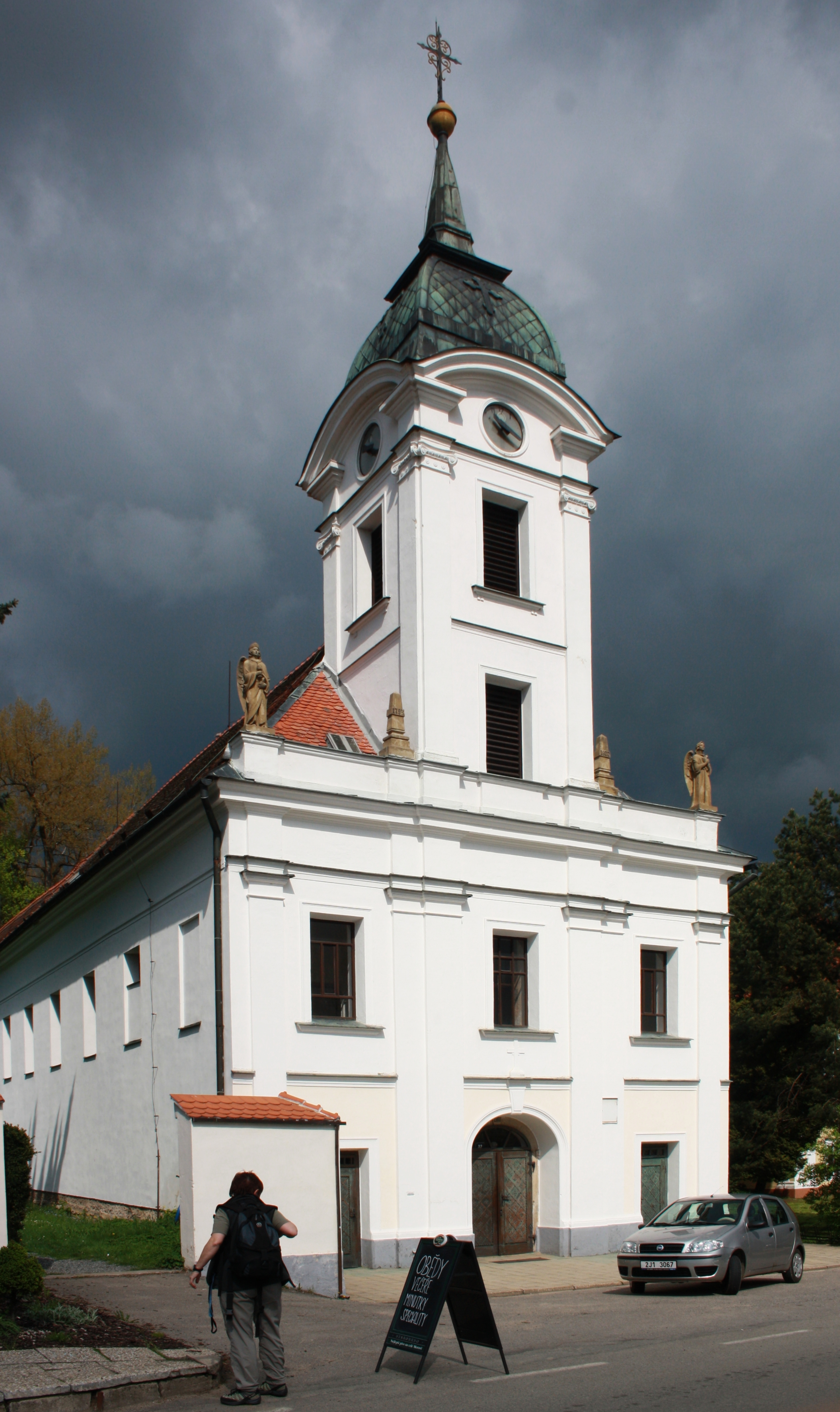 Moravec - kostel Nalezení a Povýšení svatého Kříže This photograph was taken within the scope of the 'Czech Municipalities Photographs' grant. This photograph was taken with a DSLR from WMCZ's Camera grant.